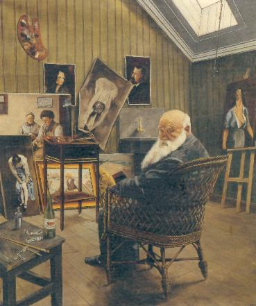 Self-portrait